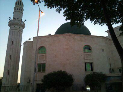 جامع عروة البارقي حمص